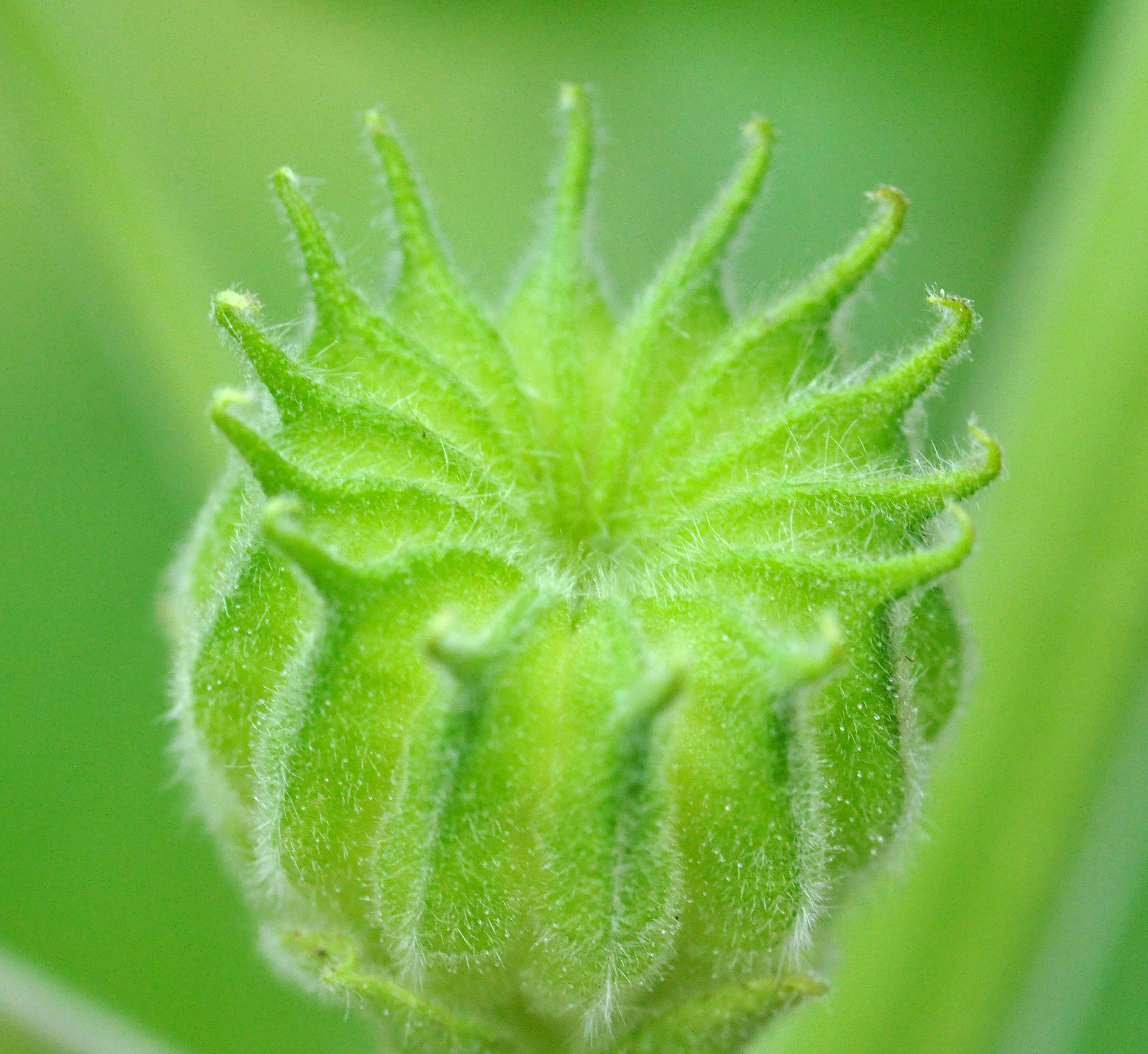 Samtpappel oder Lindenblättrige Schönmalve